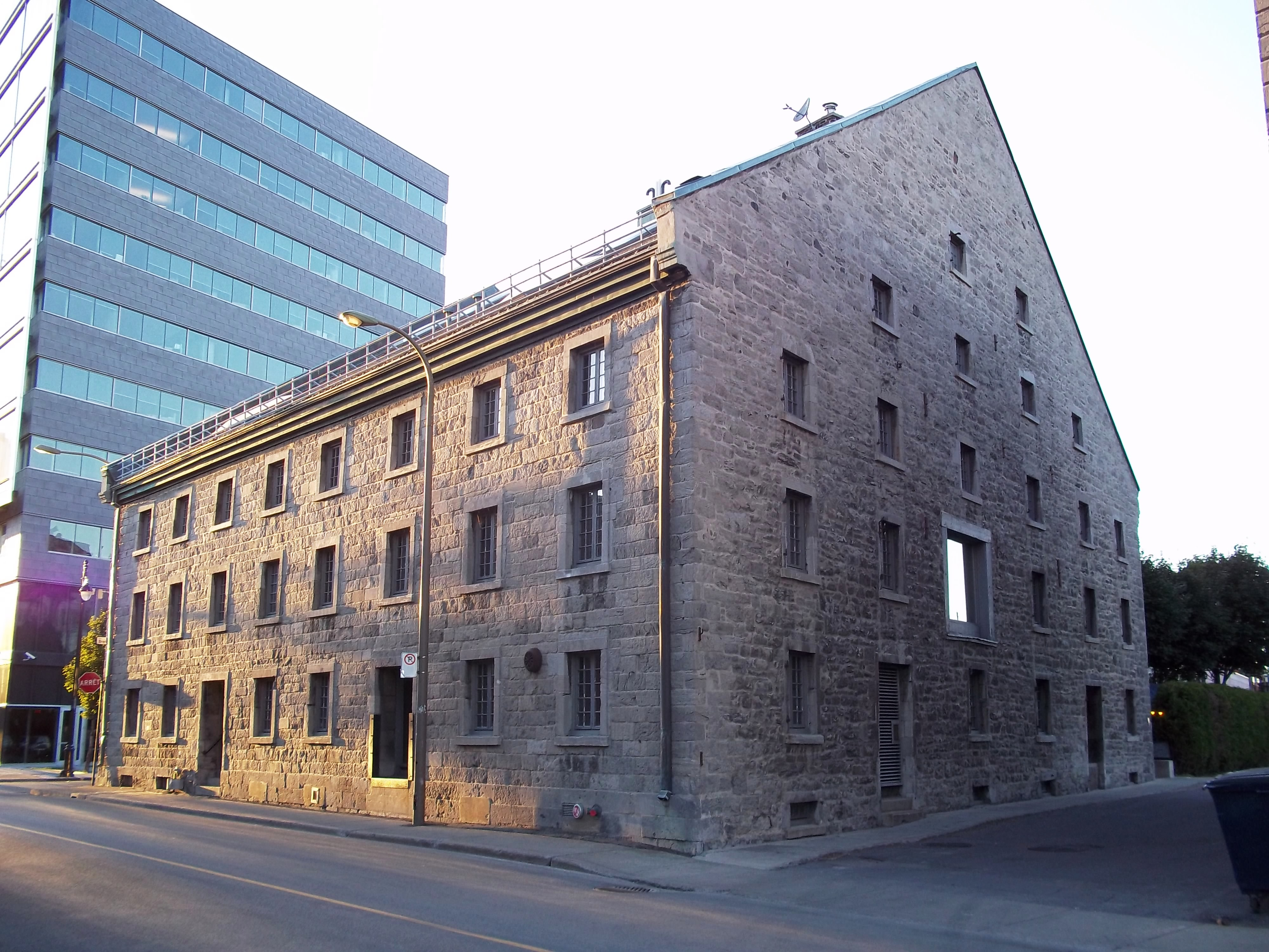 Entrepôt Buchanan, Montréal